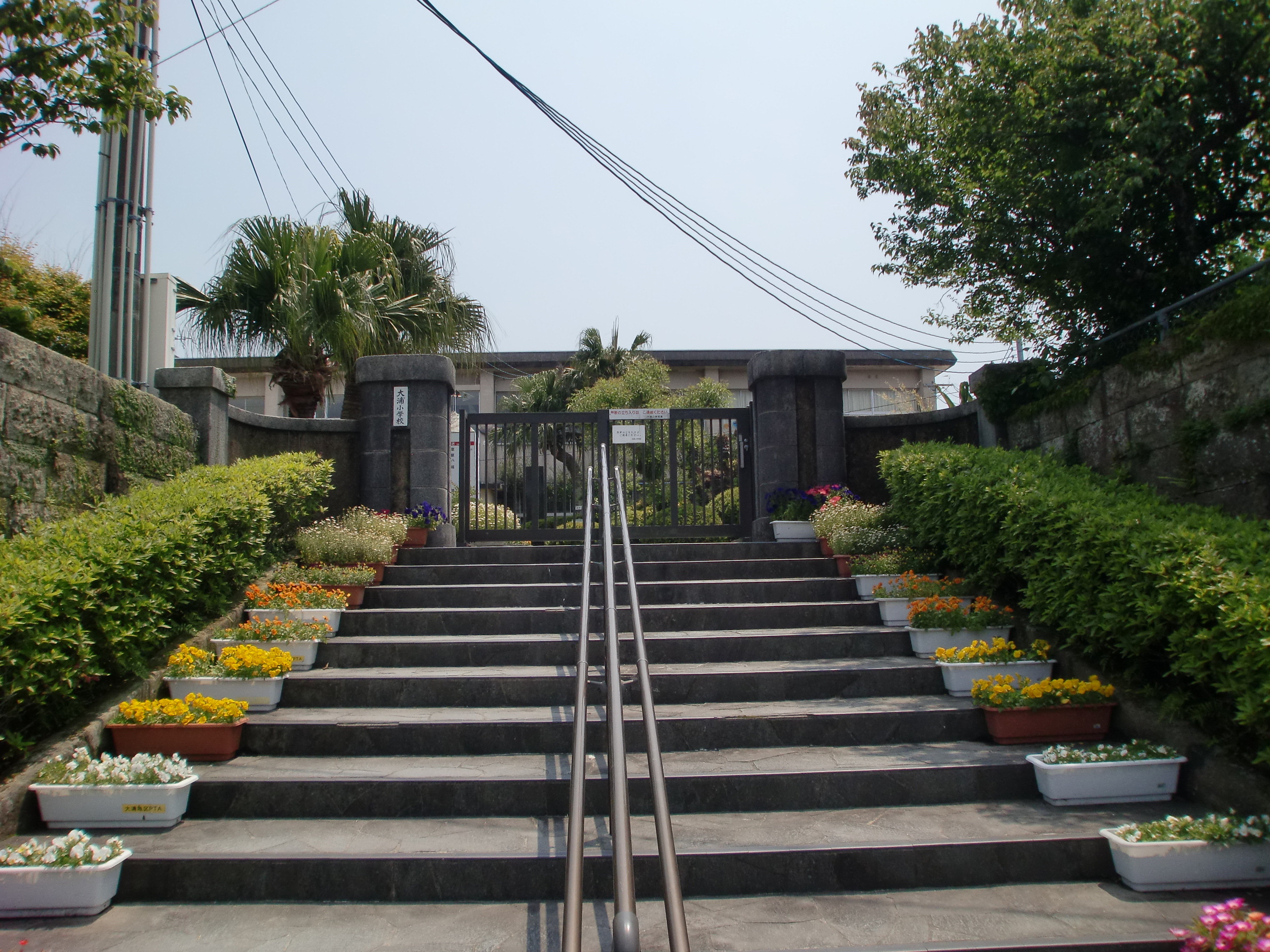 南さつま市立大浦小学校の校門。